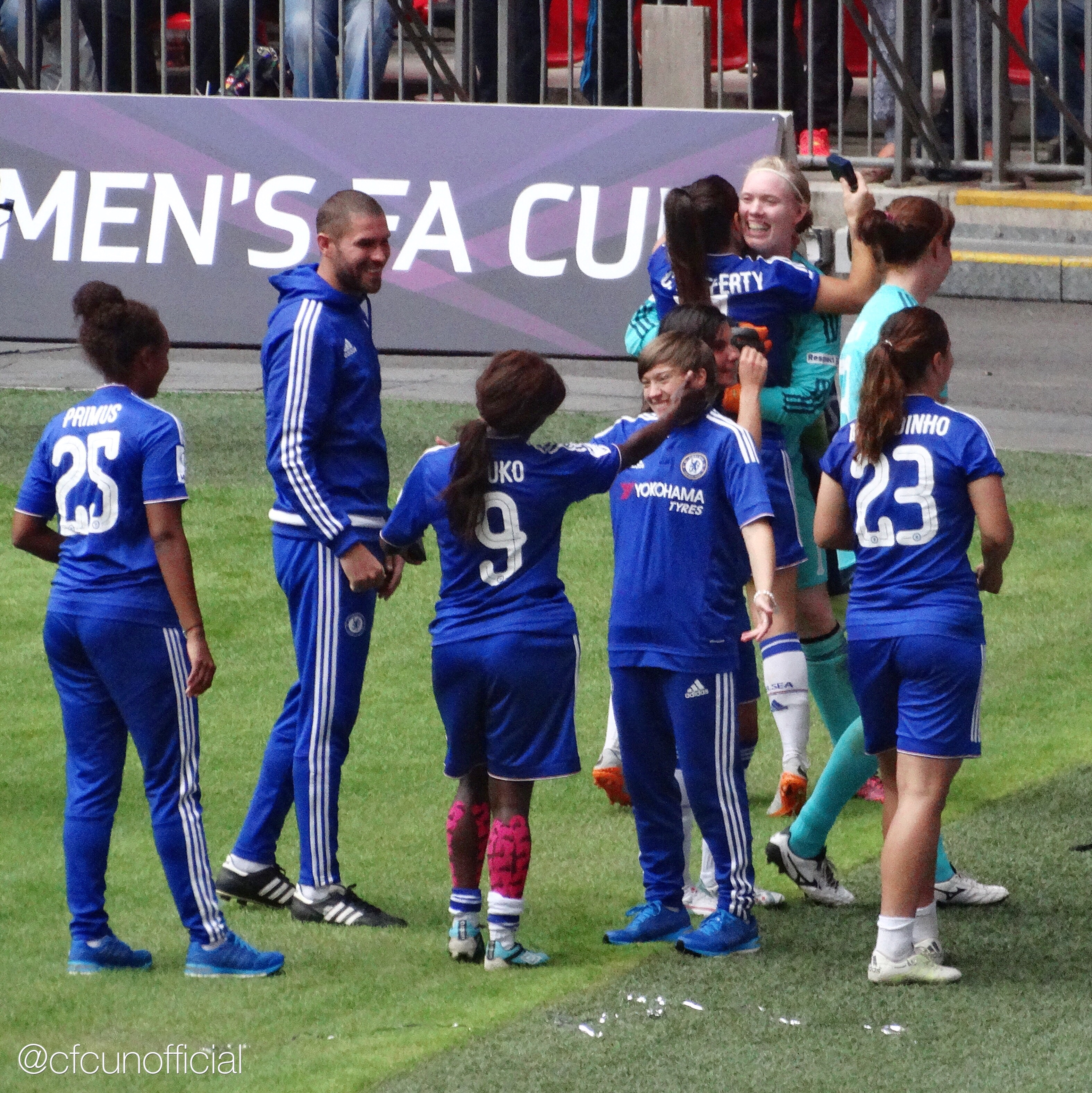 Chelsea celebrate